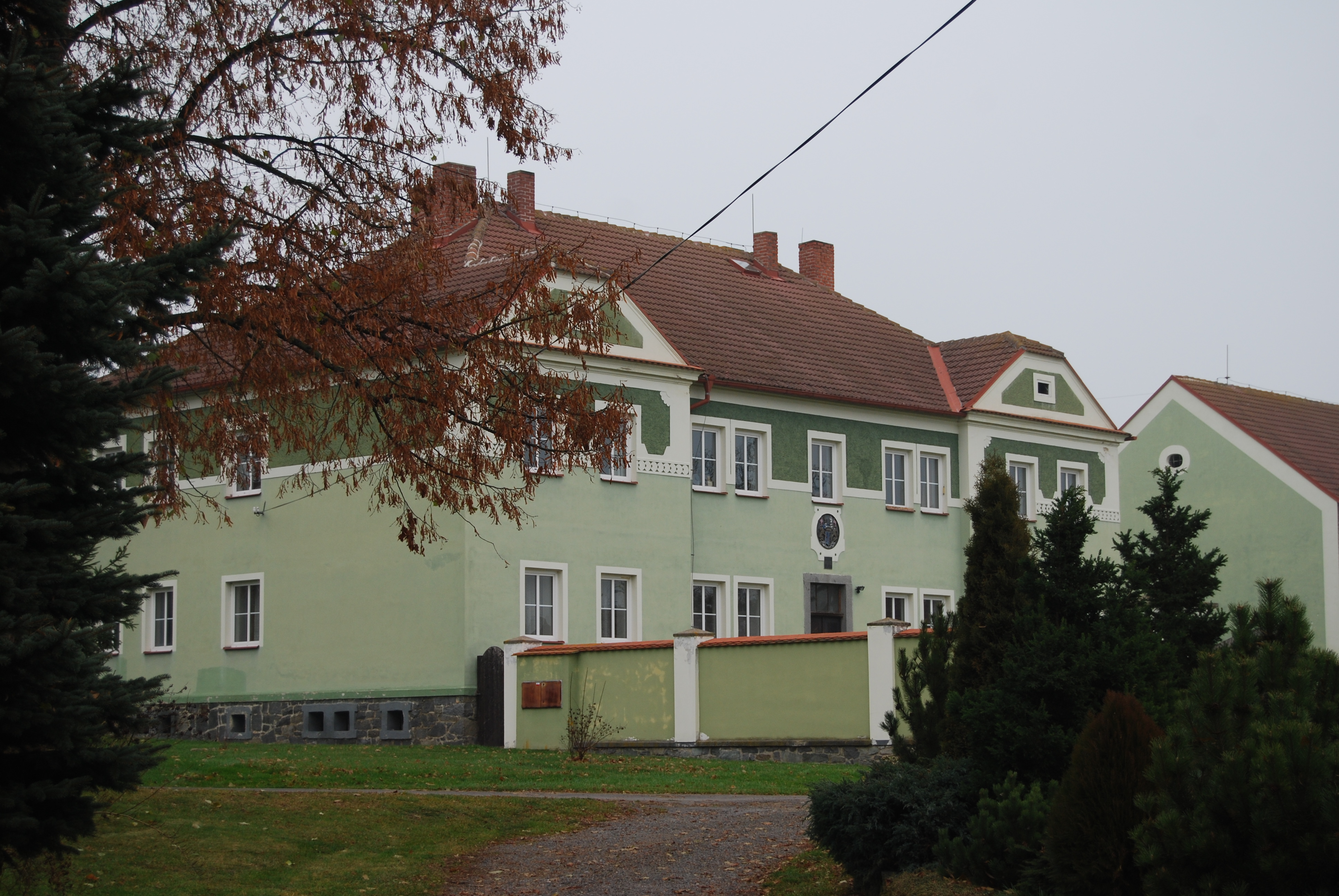 Sochovice je část města Mirovice v okrese Písek. Česká republika.